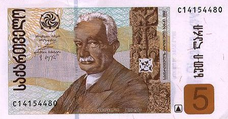 5 lari